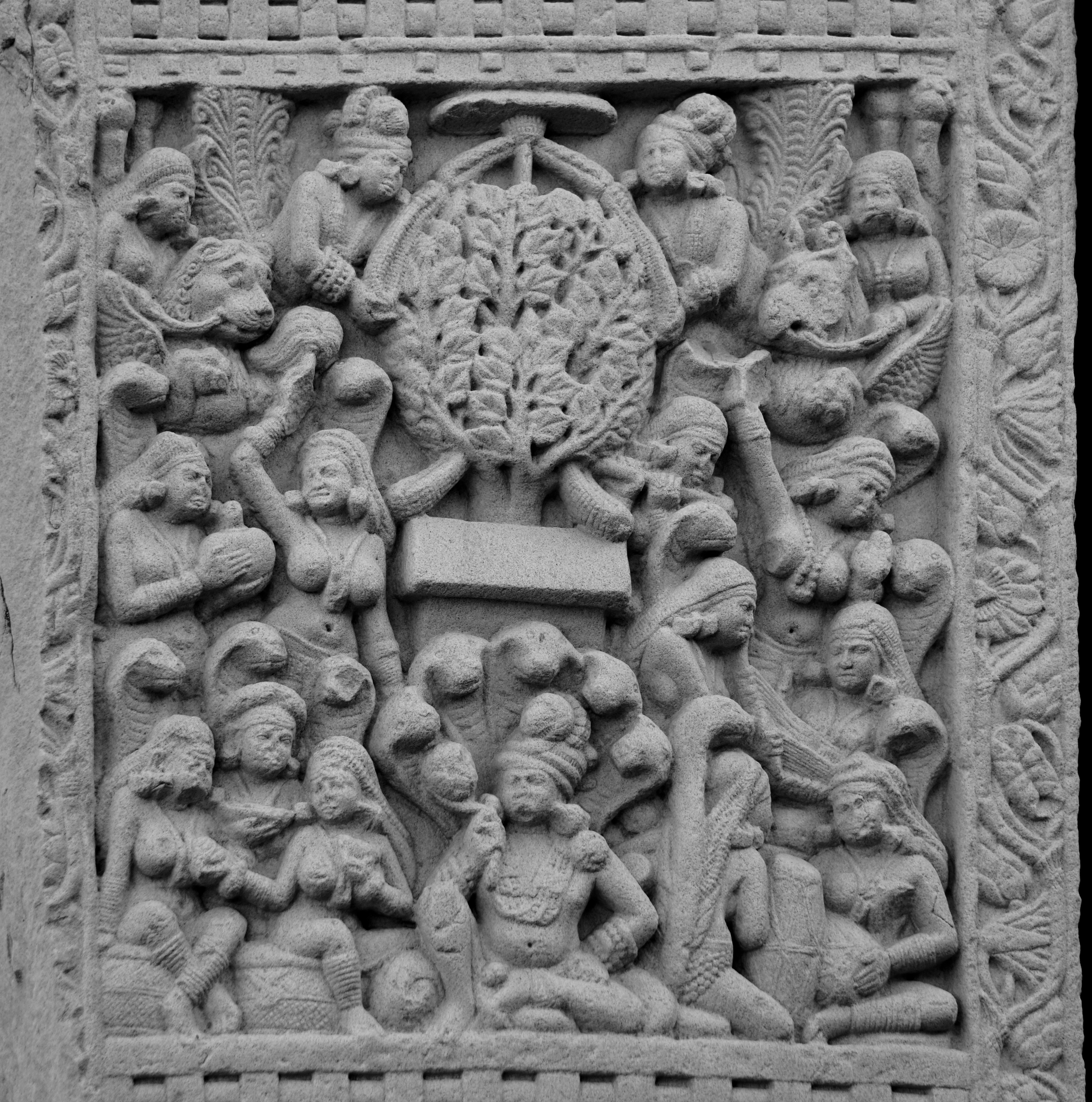 Sanchi Stupas, Vidisha, India